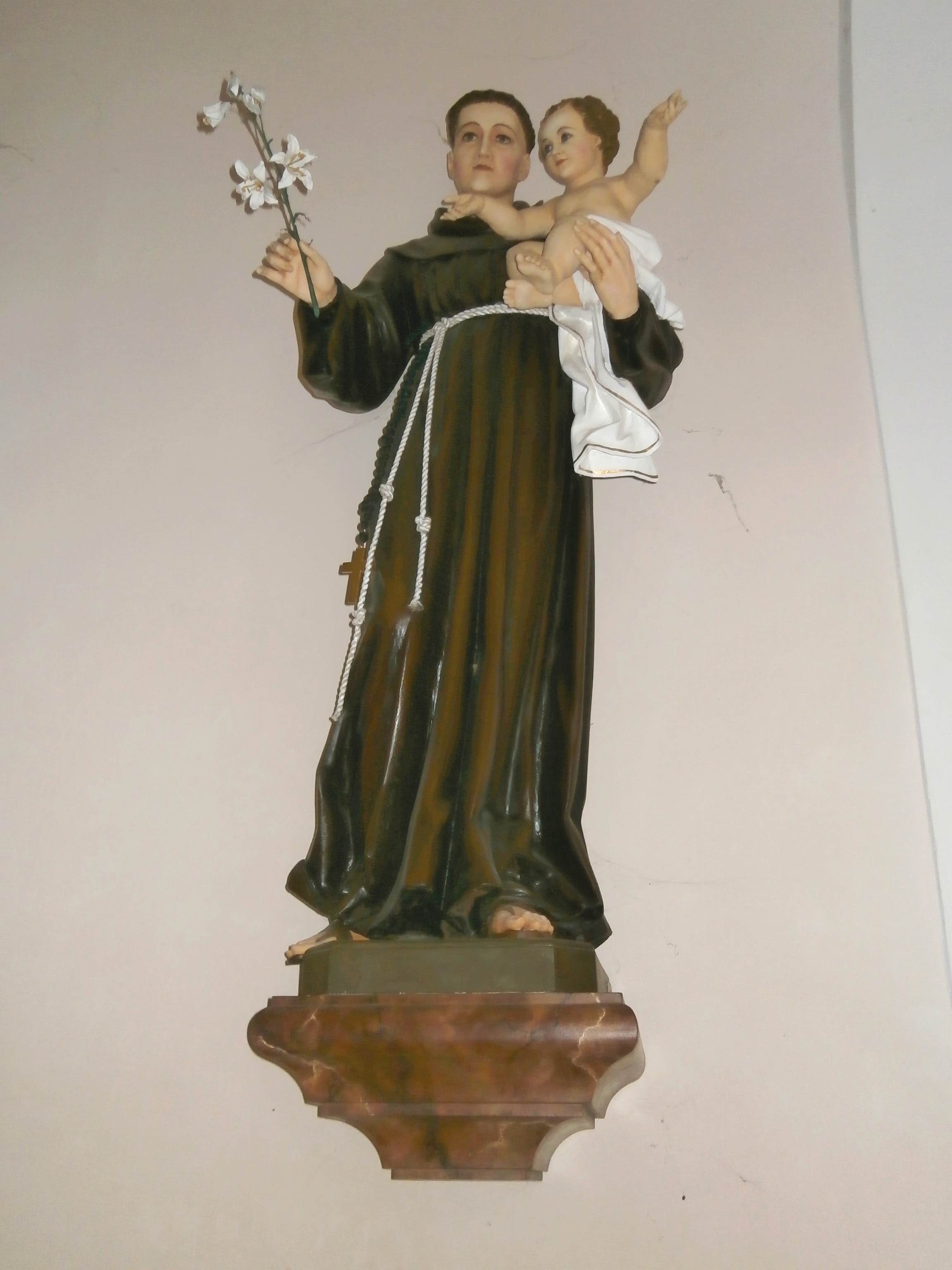 Kostel sv. Anny